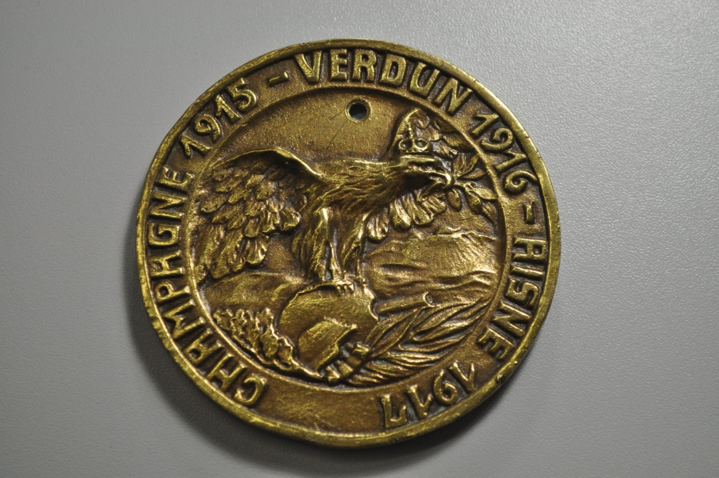 Erinnerungsmedaille der 50. Infanterie-Division mit der Aufschrift: "Champagne 1915 - Verdun 1916 - Aisne 1917". Die Vorderseite zeigt den Kopf eines Soldaten mit einem Loorbeerkranz um den Helm, die Rückseite zeigt einen Adler mit einem Zweig im Schnabel.